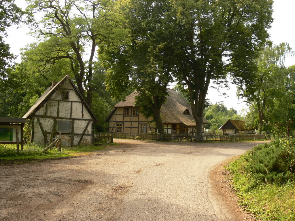 Meiers Hausstelle - ehemalige Meierei in der Rostocker Heide.